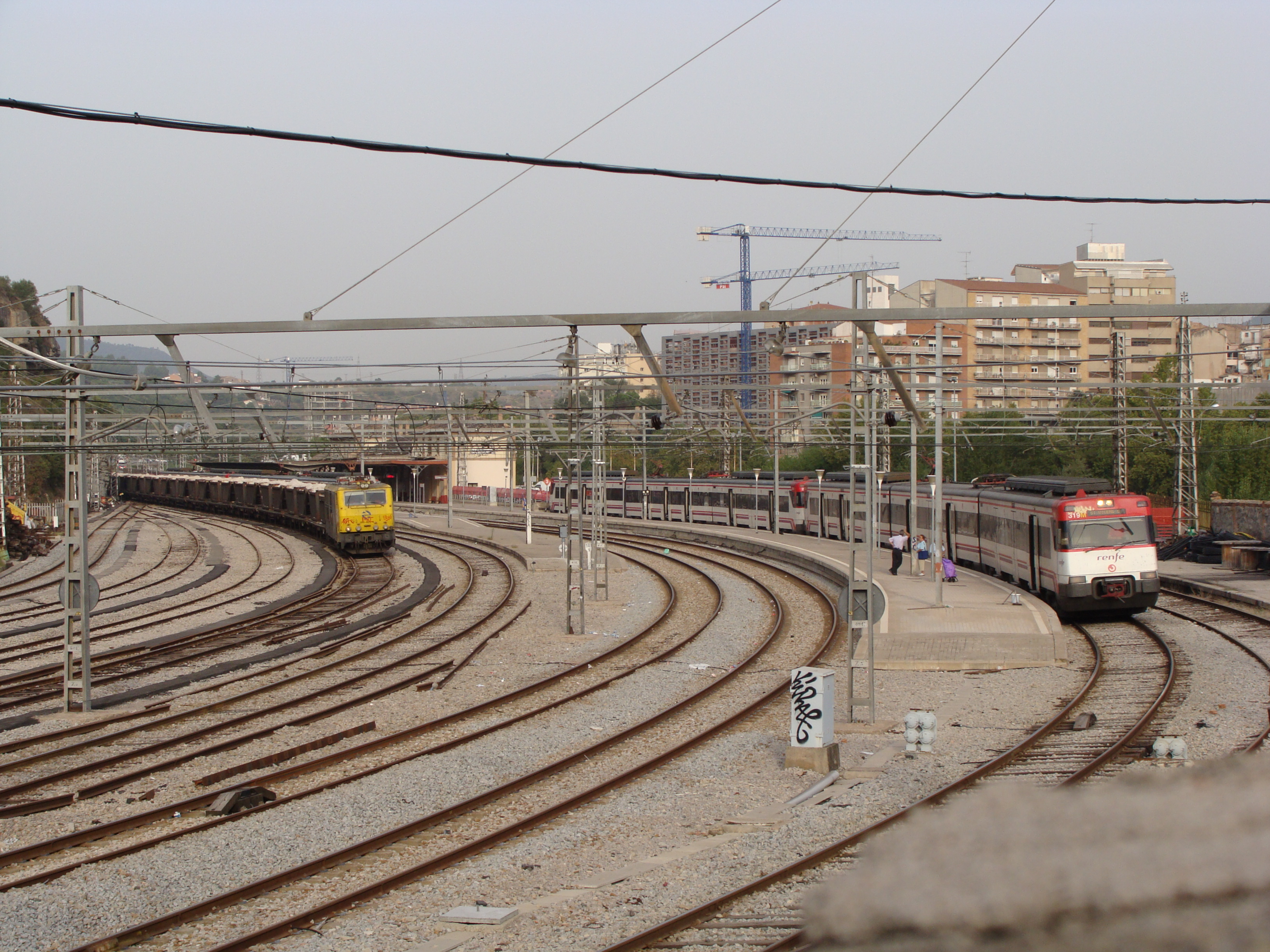 Vista general de l'estació de Manresa, amb una doble composició de 447 a la dreta i a l'esquerra el saler. Vista general de la estación de Manresa, con una doble composición de 447 a la derecha y a la izquierda el salero.